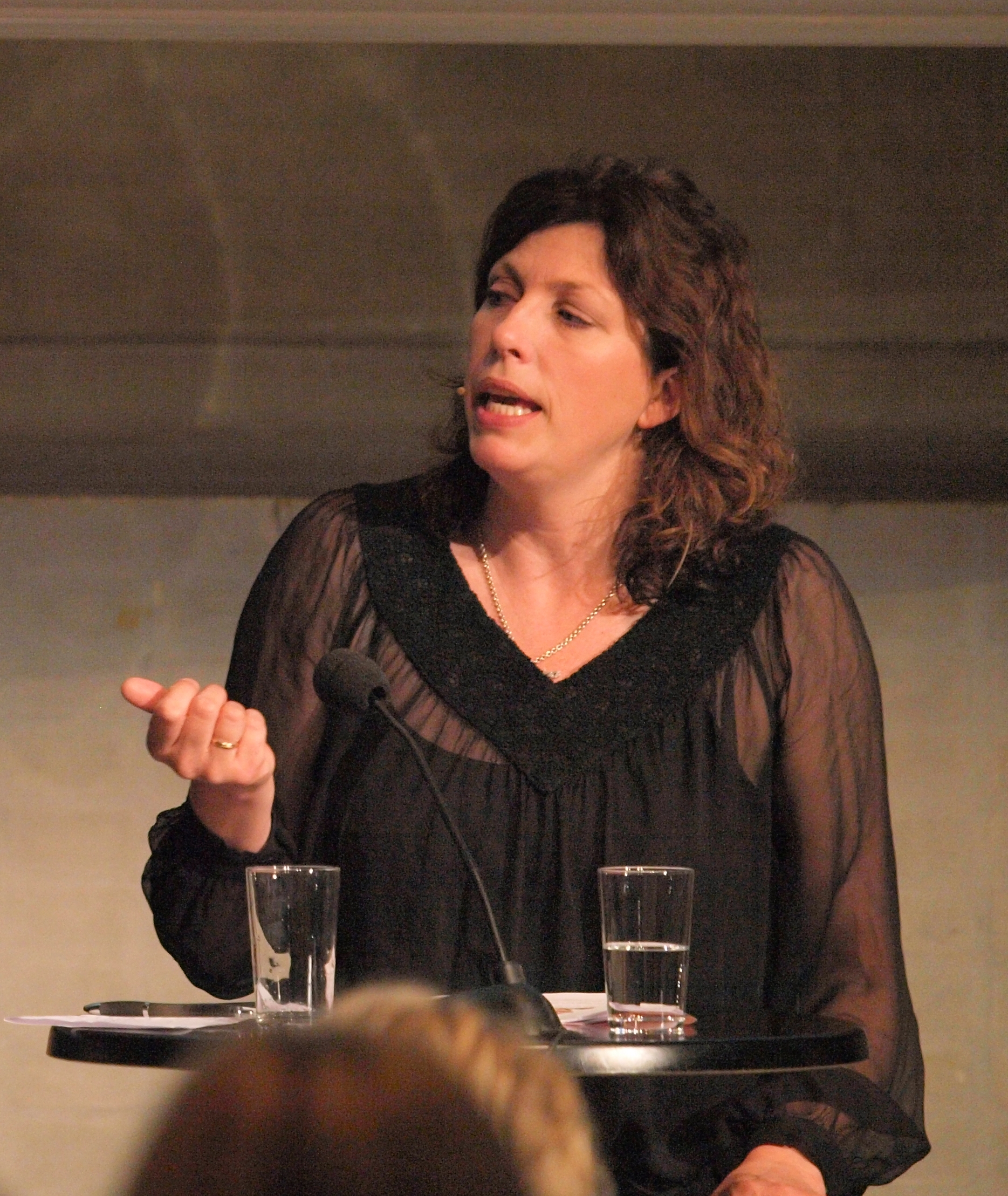 Helén Vikstvedt på Nordiske Mediedager i 2009